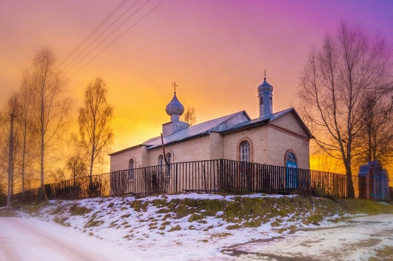 Рэчкі. Свята-Духаўская царква